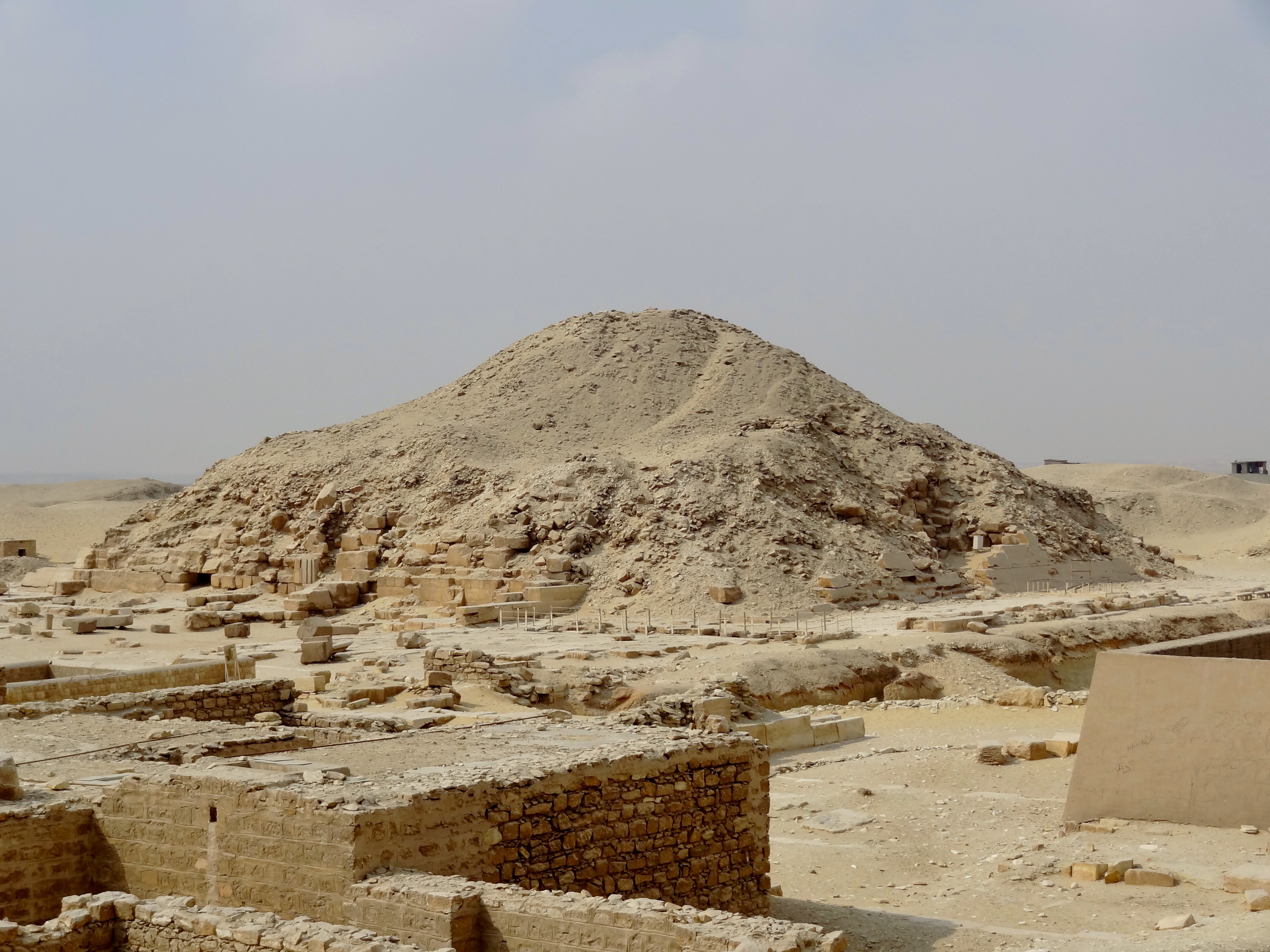 Pyramide des Unas in Sakkara, Ägypten